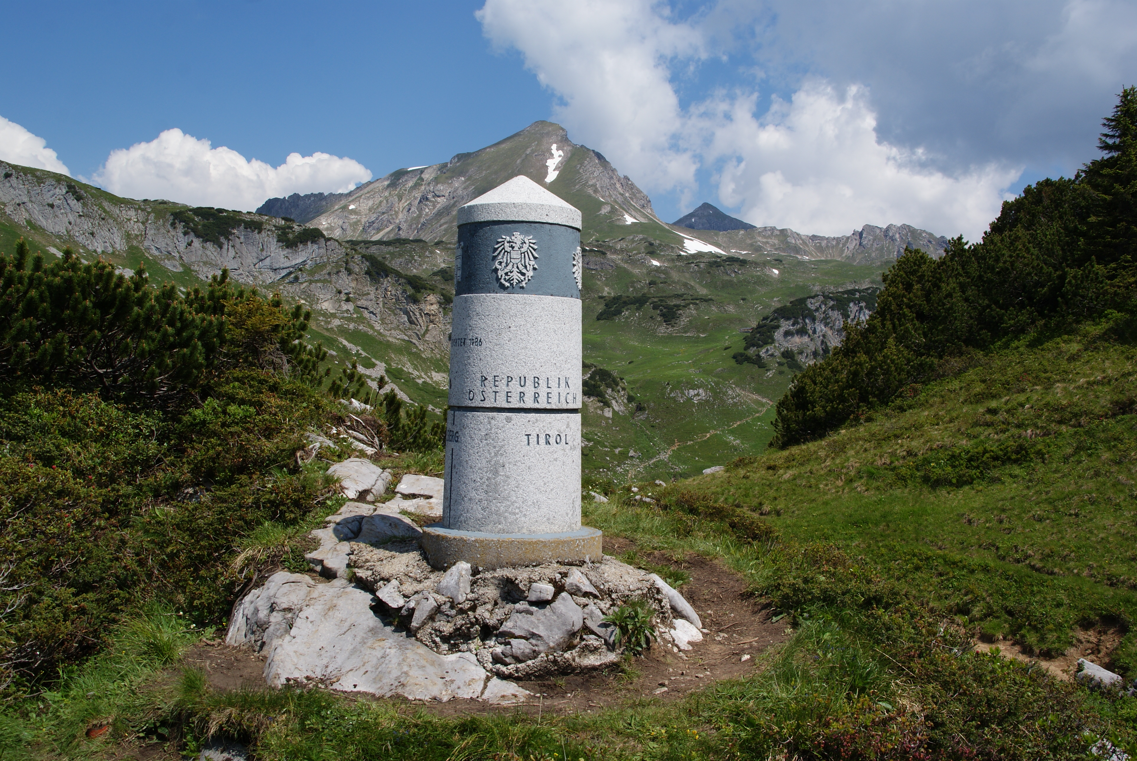 Grenzstein Haldenwanger Eck - Blick nach Deutschland